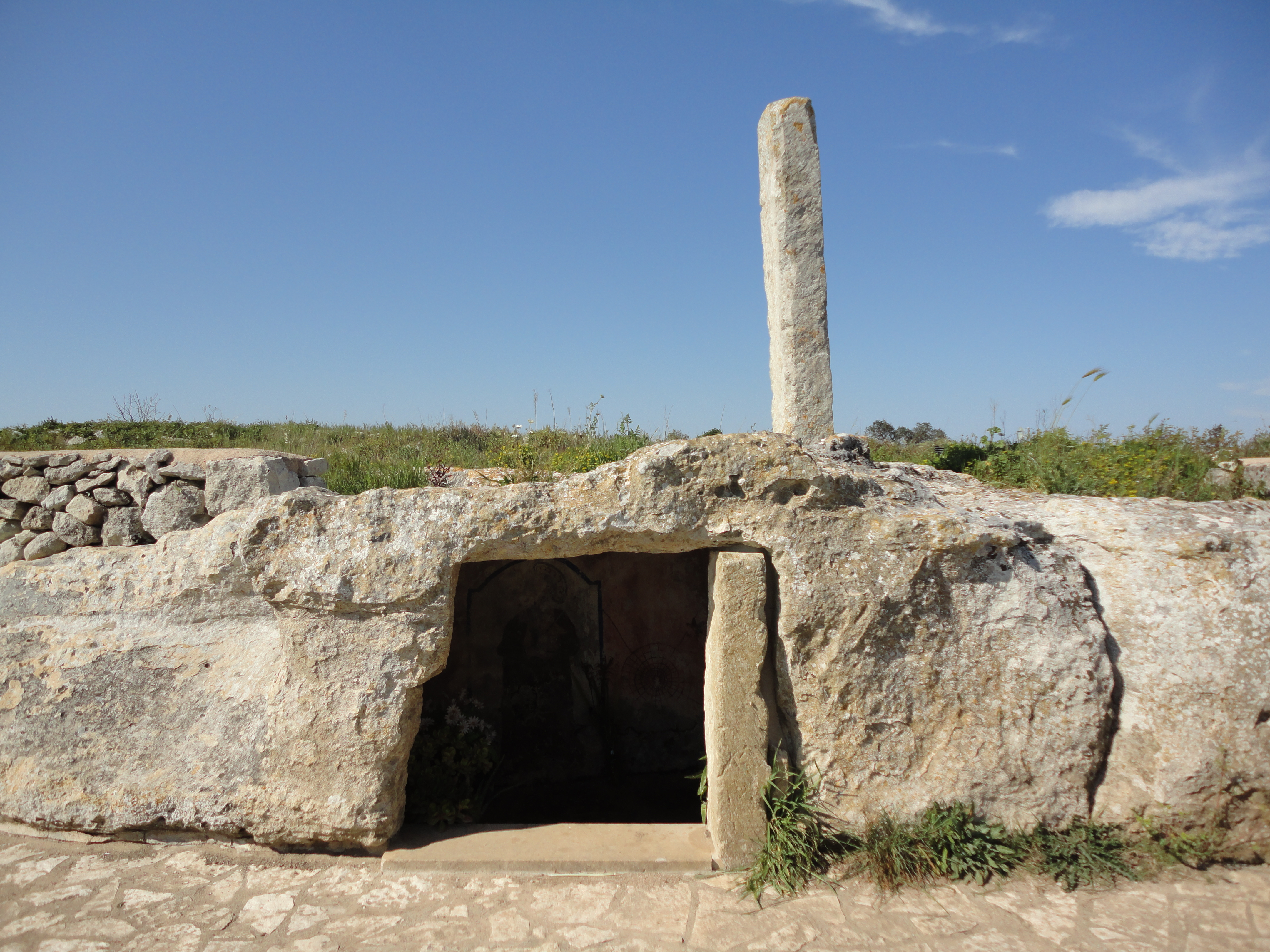 Menhir di san Paolo Giurdignano